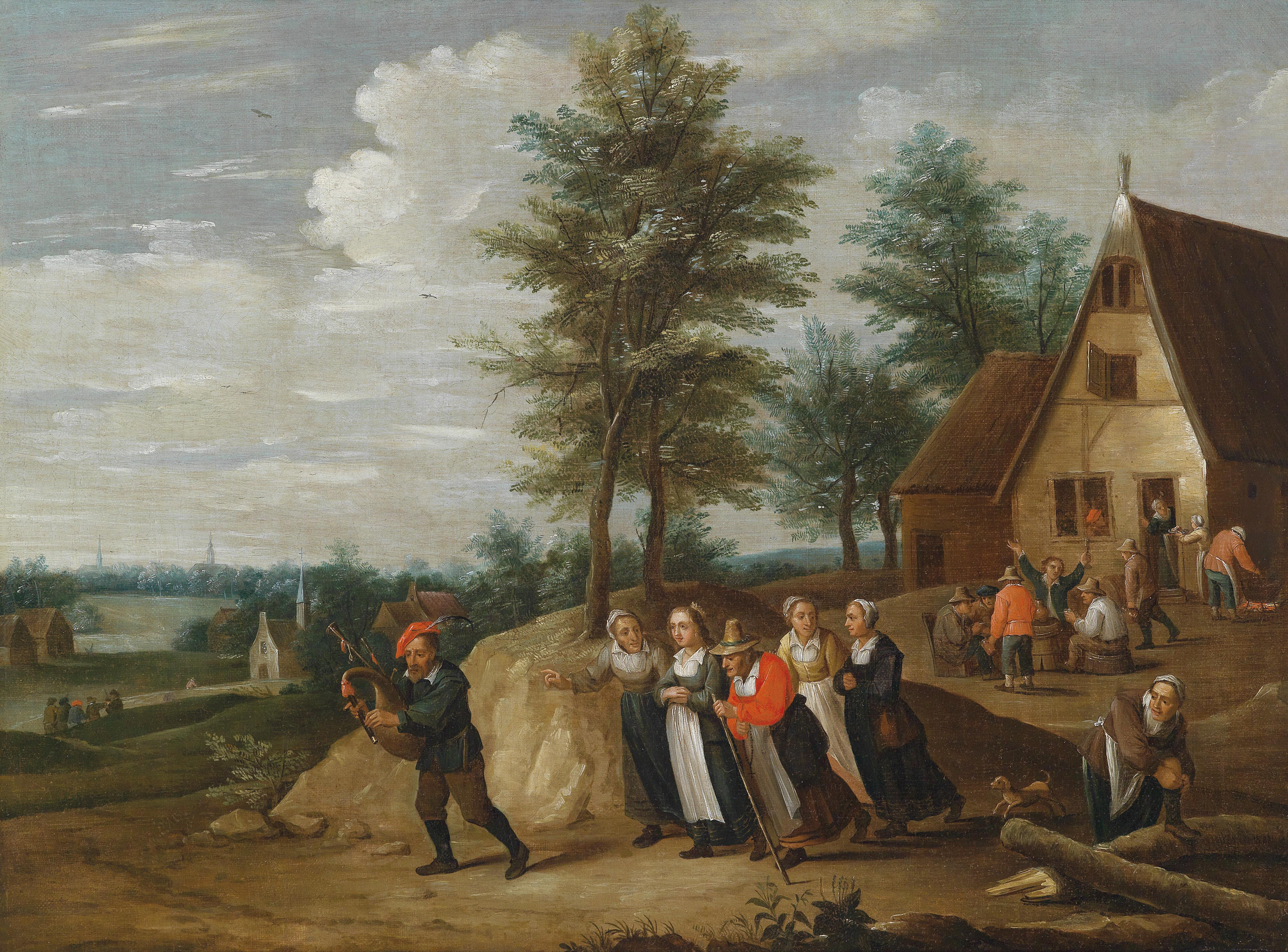 Landschaft mit einem Musikanten, dem einige Frauen folgen (Illustration zu einem Sprichwort? zu einer Sage?)